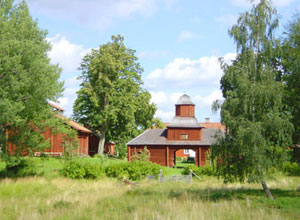 Porthuset på Näs, Bjurbäck Foto: bjurback.nu